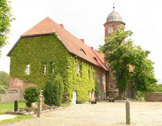 Innenhof von Burg Brome Foto aufgenommen von Benutzer Benutzer:Axel Hindemith, Mai 2005